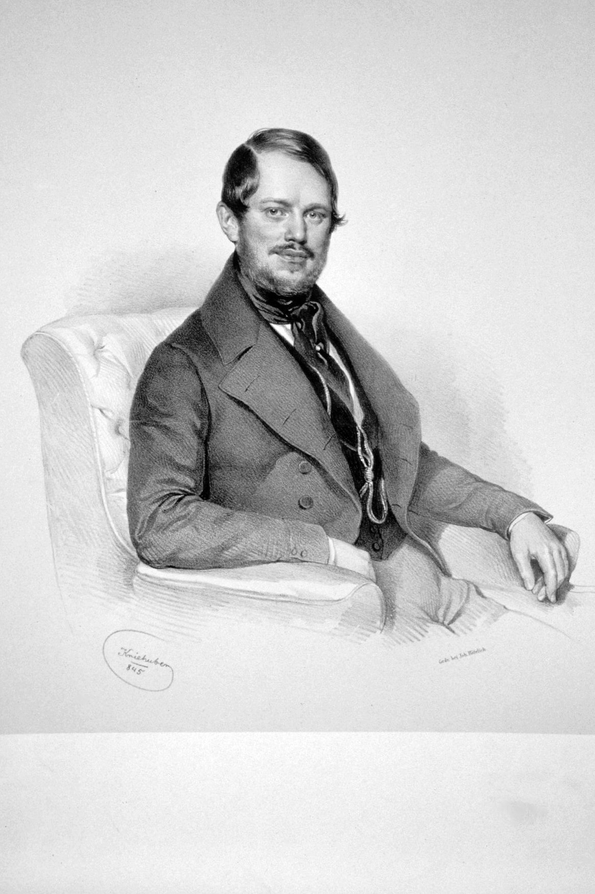 Simon Georg Freiherr von Sina (1810-1876) Bankier, Philanthrop Lithographie von Josef Kriehuber, 1845